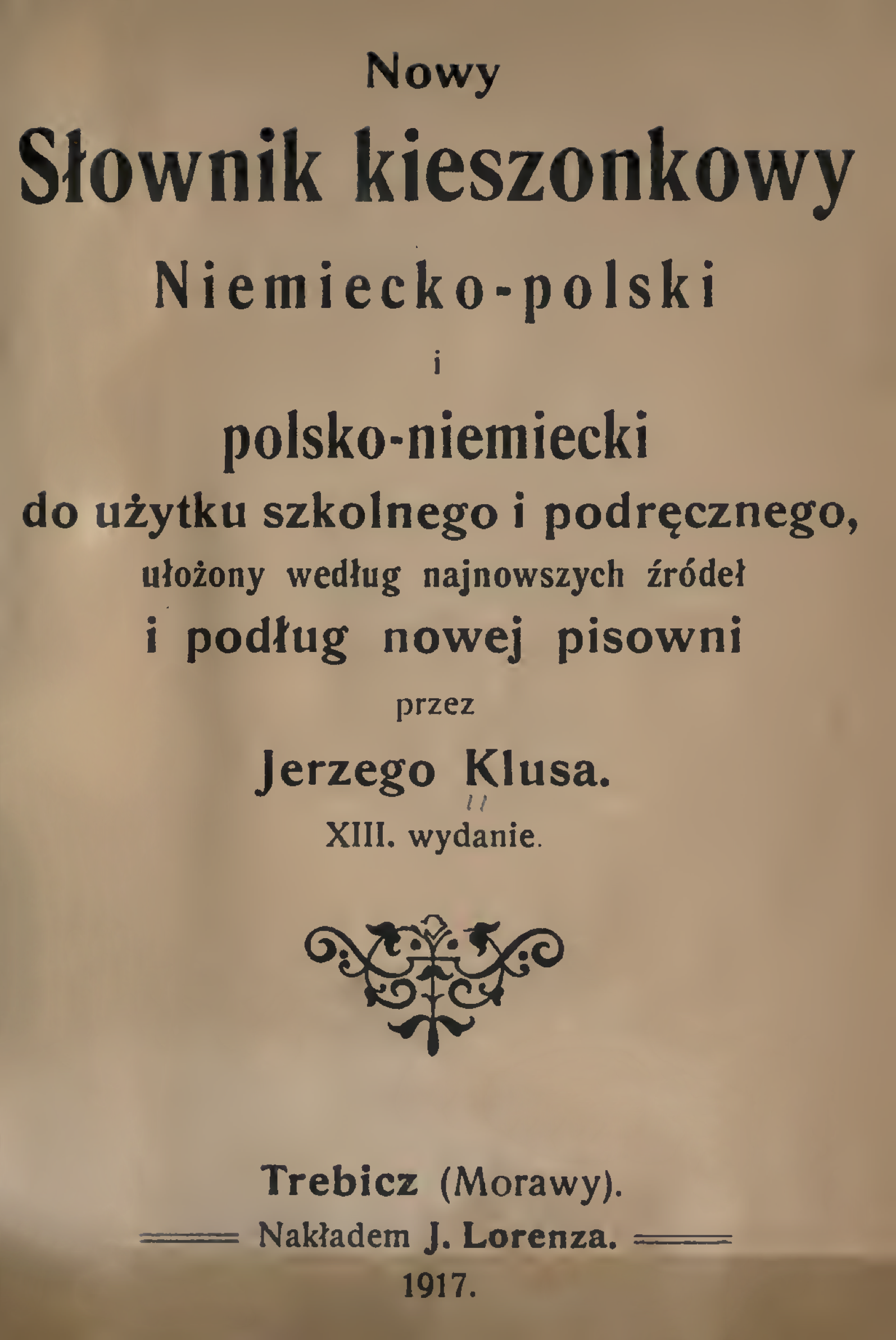 Jerzy Klus, "Słownik niemiecko-polski", 1917.